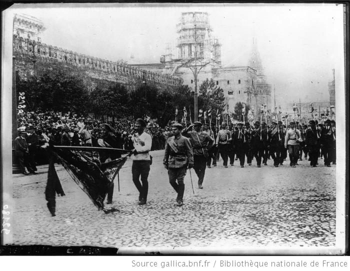 Desfile del Ejército Rojo en Moscú en 1921 ante Trotski, durante el congreso del COmintern.